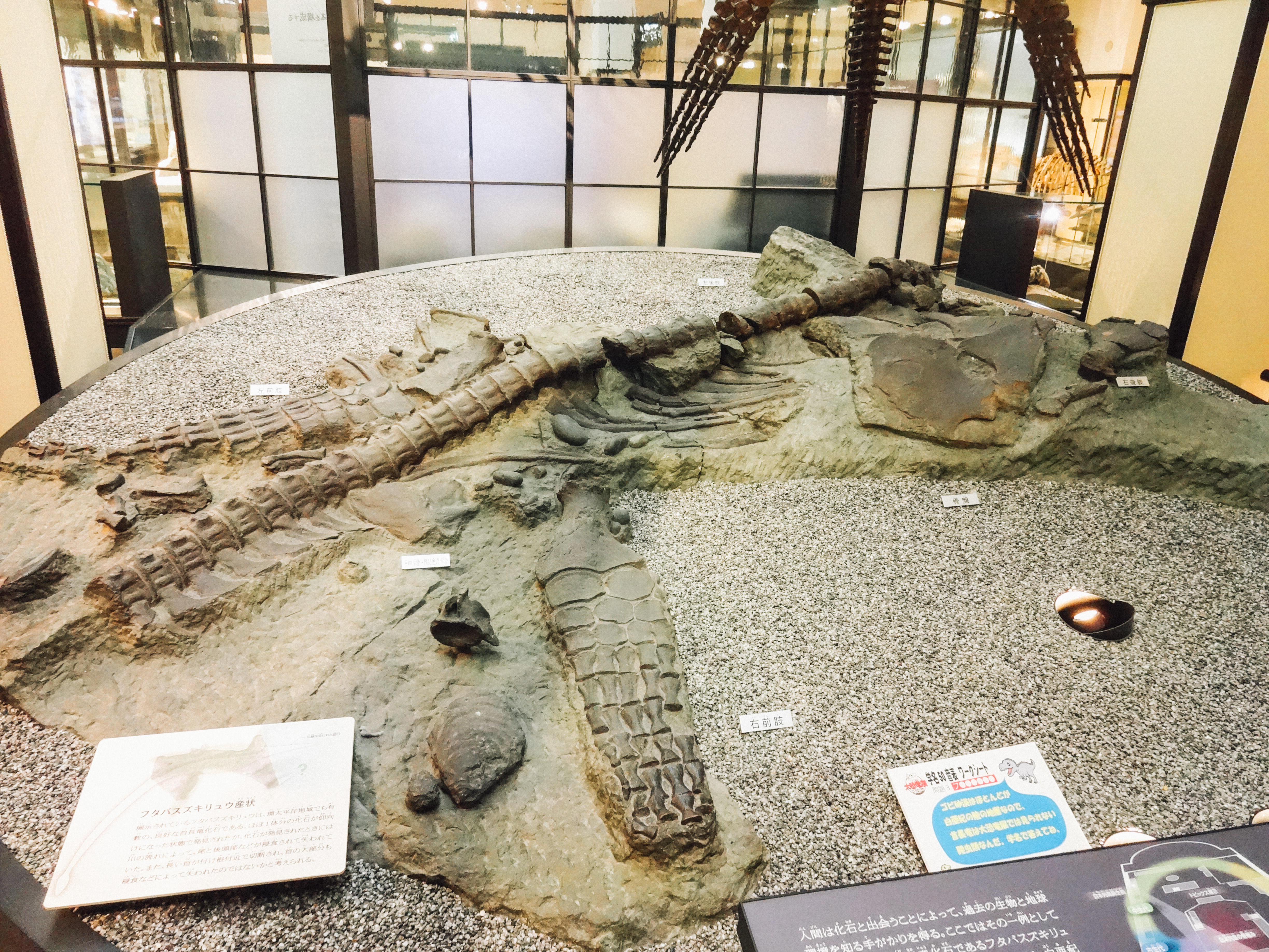 国立科学博物館 日本館 フタバスズキリュウ